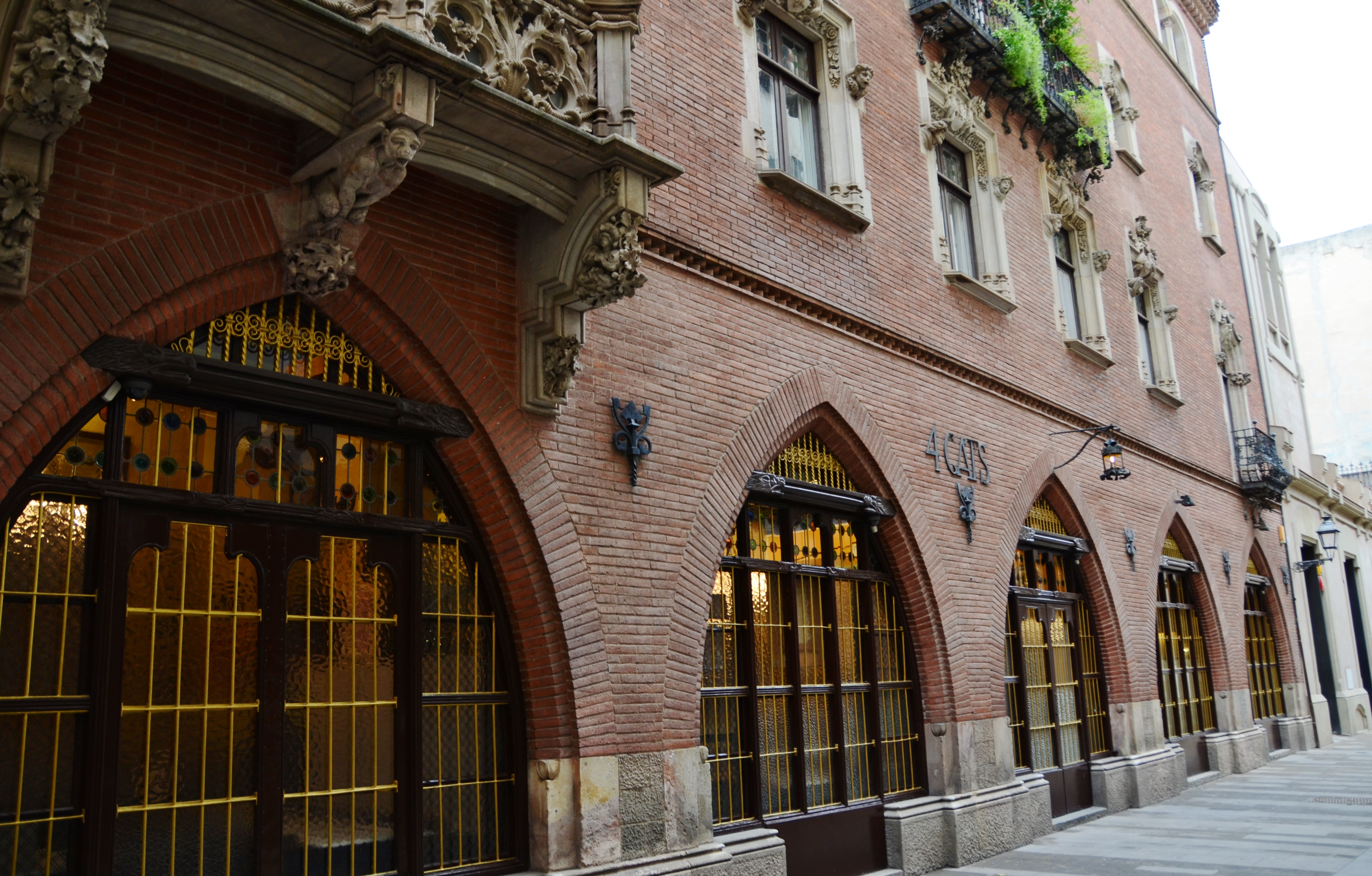 Casa Martí, o Els Quatre Gats, Barri Gòtic, Barcelona